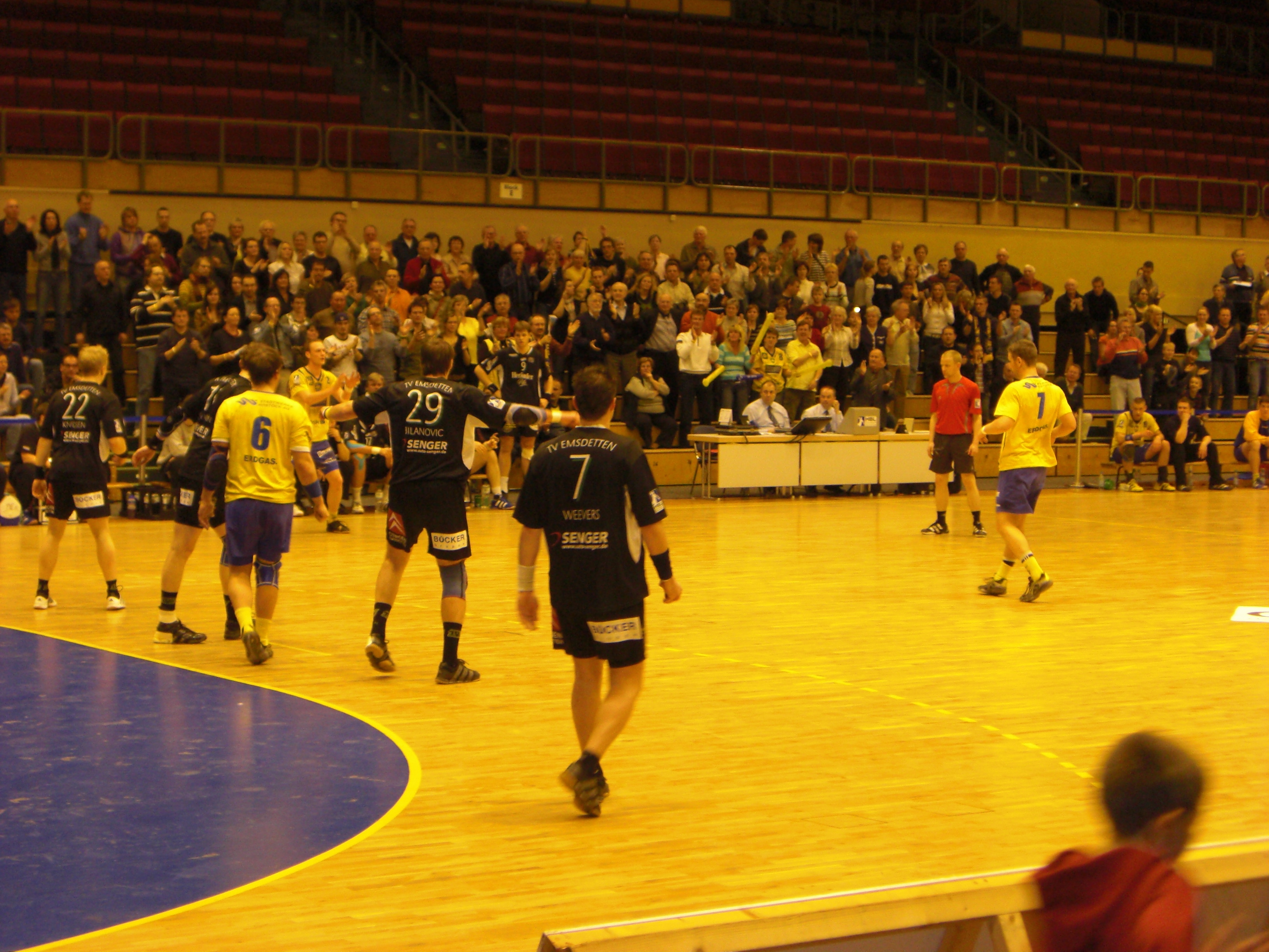 HC Empor Rostock im Spiel gegen Emstetten